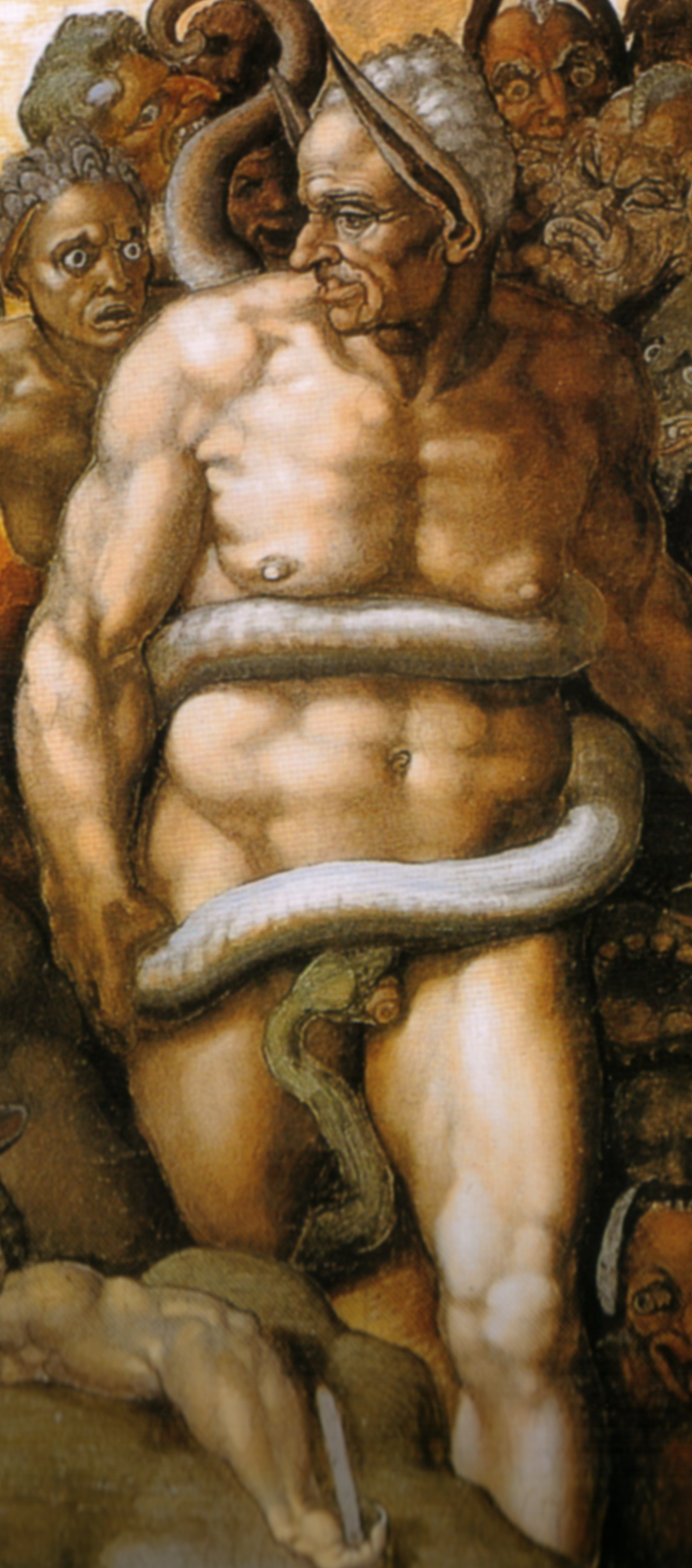 MICHELANGELO Buonarroti Last Judgment Fresco, 1370 x 1220 cm Cappella Sistina, Vatican